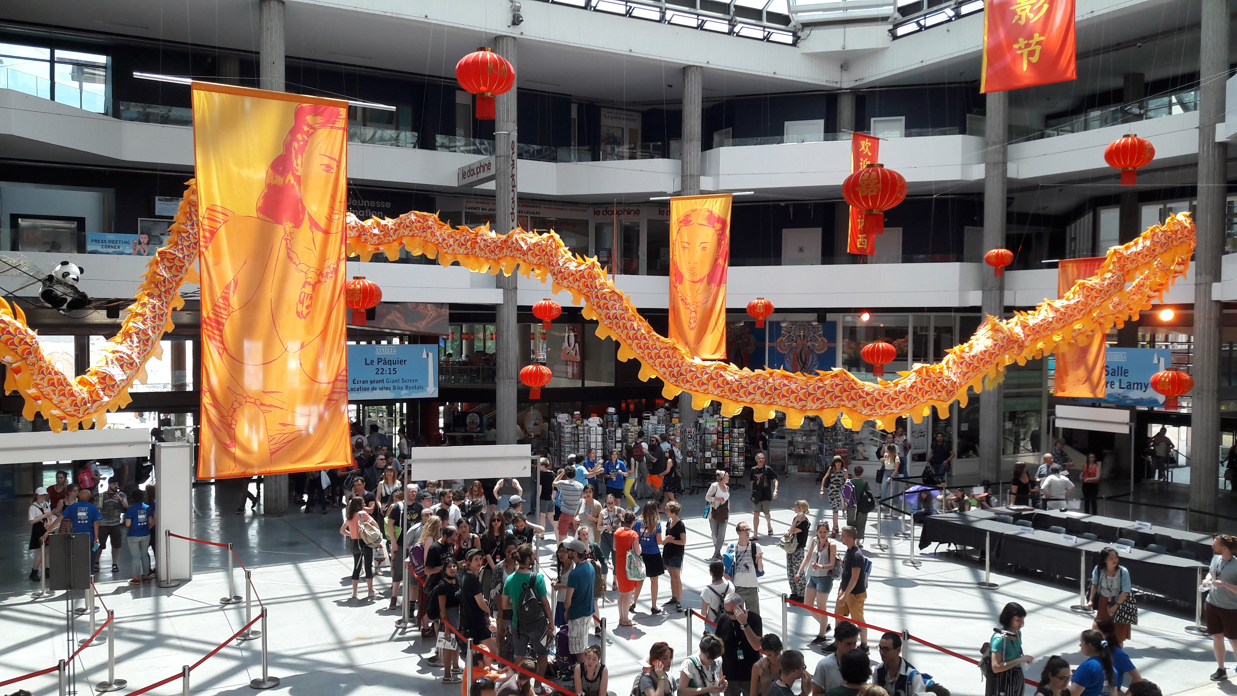 Le centre culturel de Bonlieu décoré à l'occasion du Festival international d'un film d'animation d'Annecy 2016